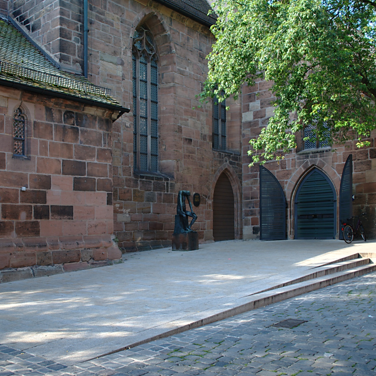 Klarakirche in Nürnberg. Vorplatz von Nordosten. Links im Bild die Sakristei, daneben die Plastik „Hiob“ von Gerhard Marcks. Das geschlossene braune Portal ist der ehemalige Eingang der Kirche (bis 2006), das Portal mit den Glastüren rechts daneben ist der Eingang der Pirckheimerkapelle und Haupteingang zur Kirche seit 2007.